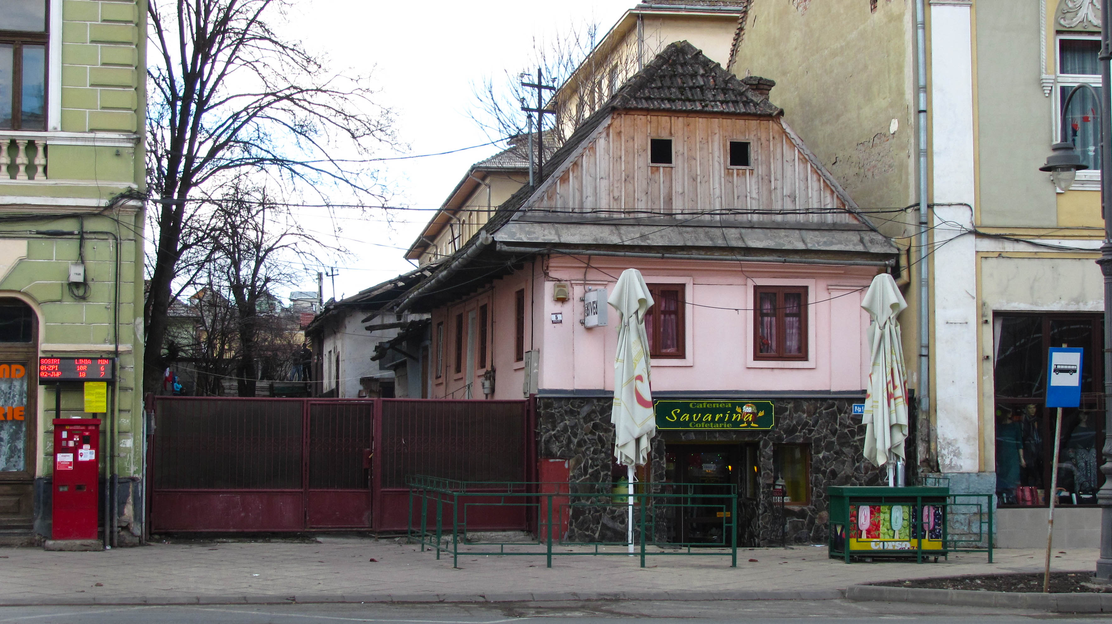 Turda, Casa rurală, Piata 1 Decembrie 1918 nr.5